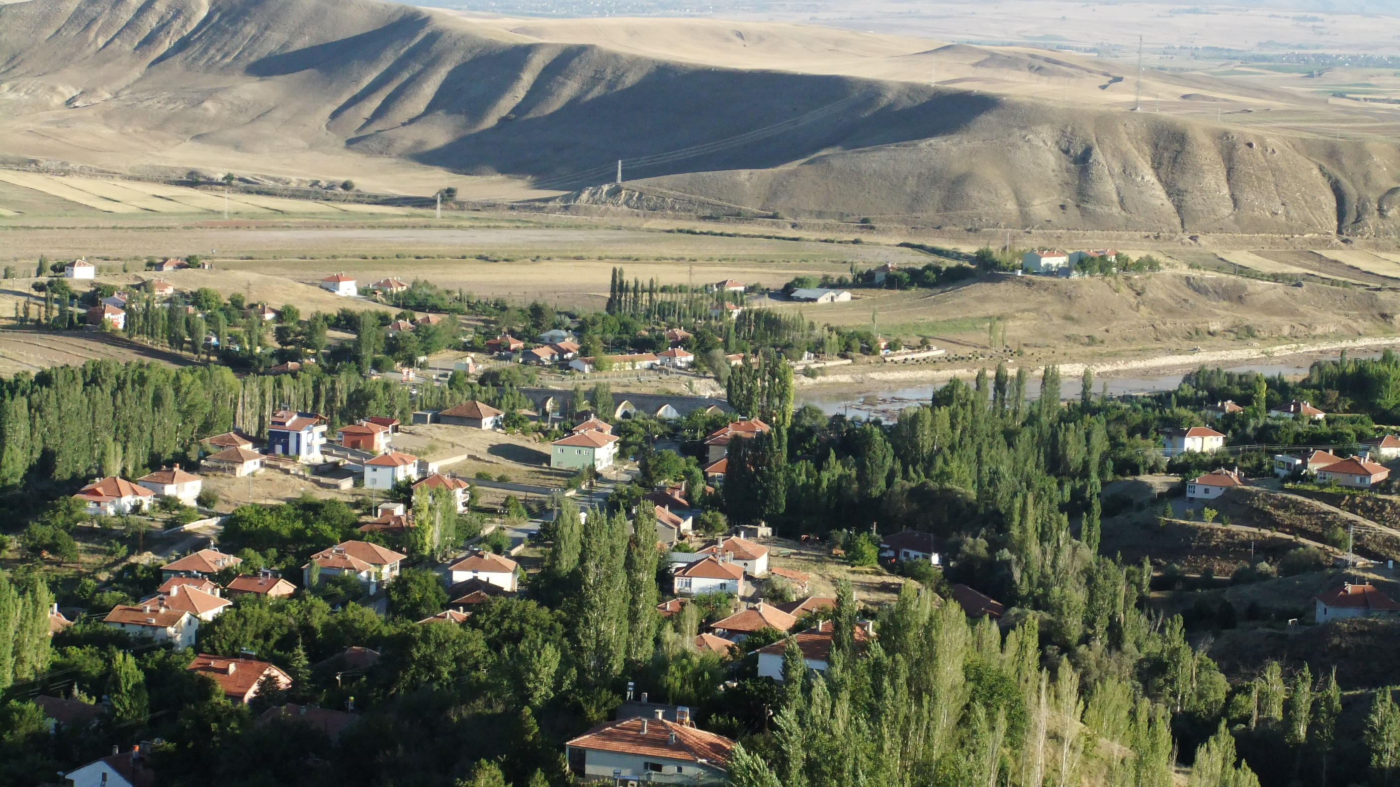 Karaözü ve Şahruh Köprüsü